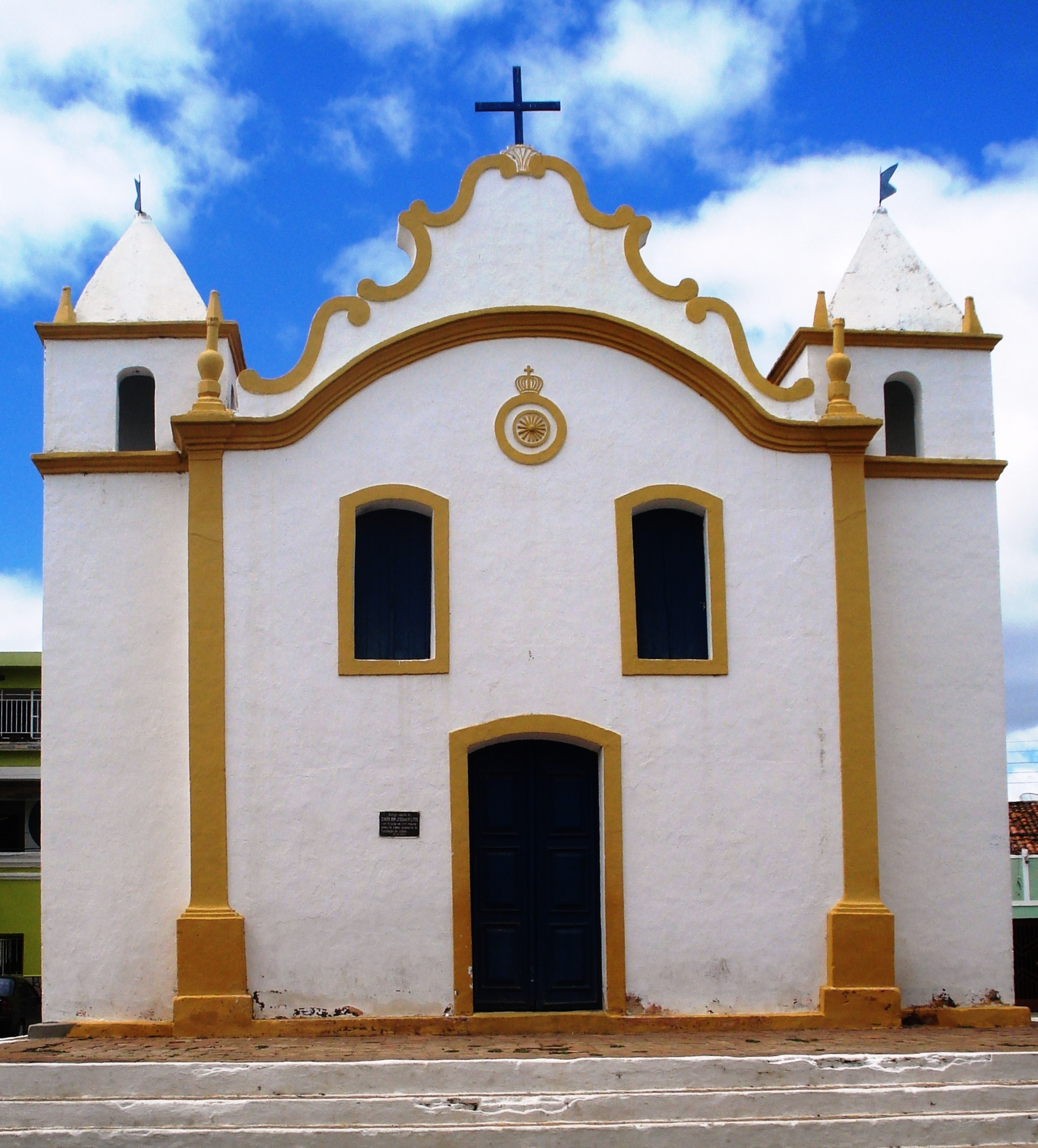 Em estilo barroco. Construída em meados do séc. XVIII. Situada na antiga Fazenda Grande, hoje município de Floresta, Pernambuco.